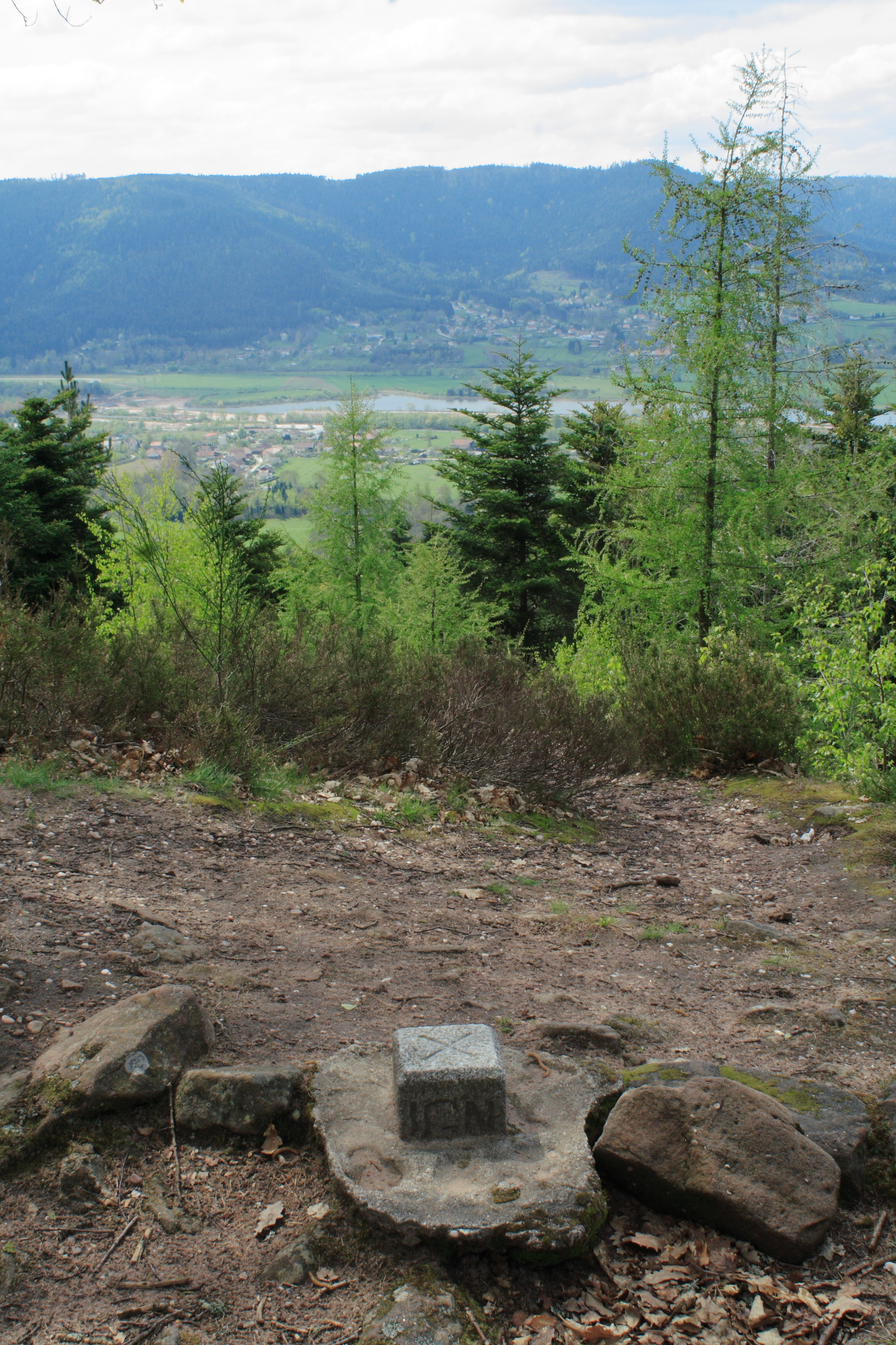 Borne de l'IGN, camp celtique de la Bure, France. Point géodésique 8841303 A.